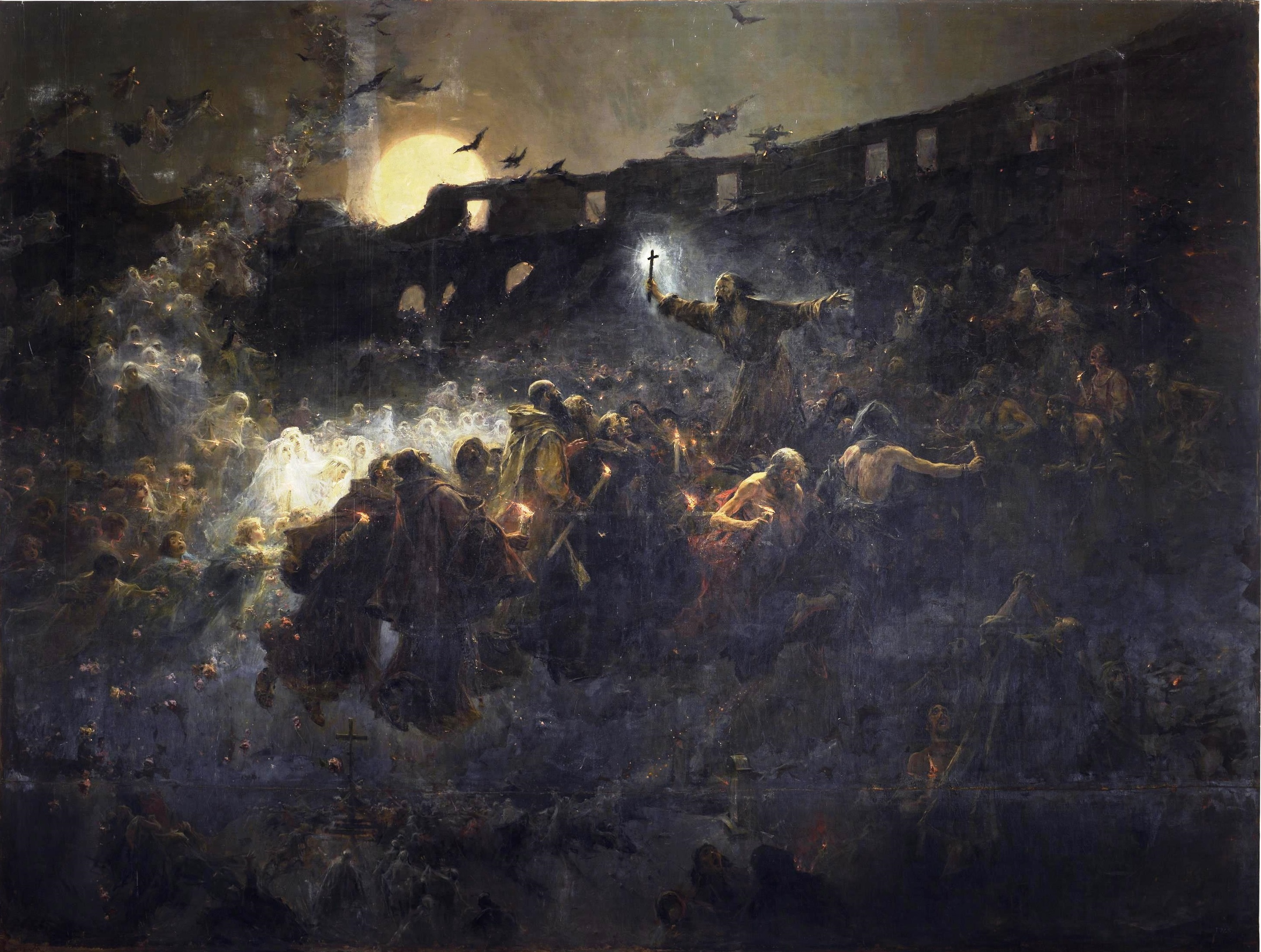 La obra representa a San Almáquio, que fue un mártir cristiano del siglo IV que quiso con su intercesión poner fin a las luchas de gladiadores que tenían lugar en el Anfiteatro Flavio, más conocido como Coliseo. La escena, situada en un Coliseo ya en ruinas, muestra la aparición del santo portando una cruz en torno al cual se agolpa la multitud, creando un avisión espectral de acentuado dramatismo. Su autor presentó el cuadro a la Exposición Nacional de Bellas Artes de 1887, recibiendo una crítica adversa por ser calificado el cuadro de incomprensible, aunque obtuvo una medalla de primera clase y fue adquirido por el Estado espàñol.